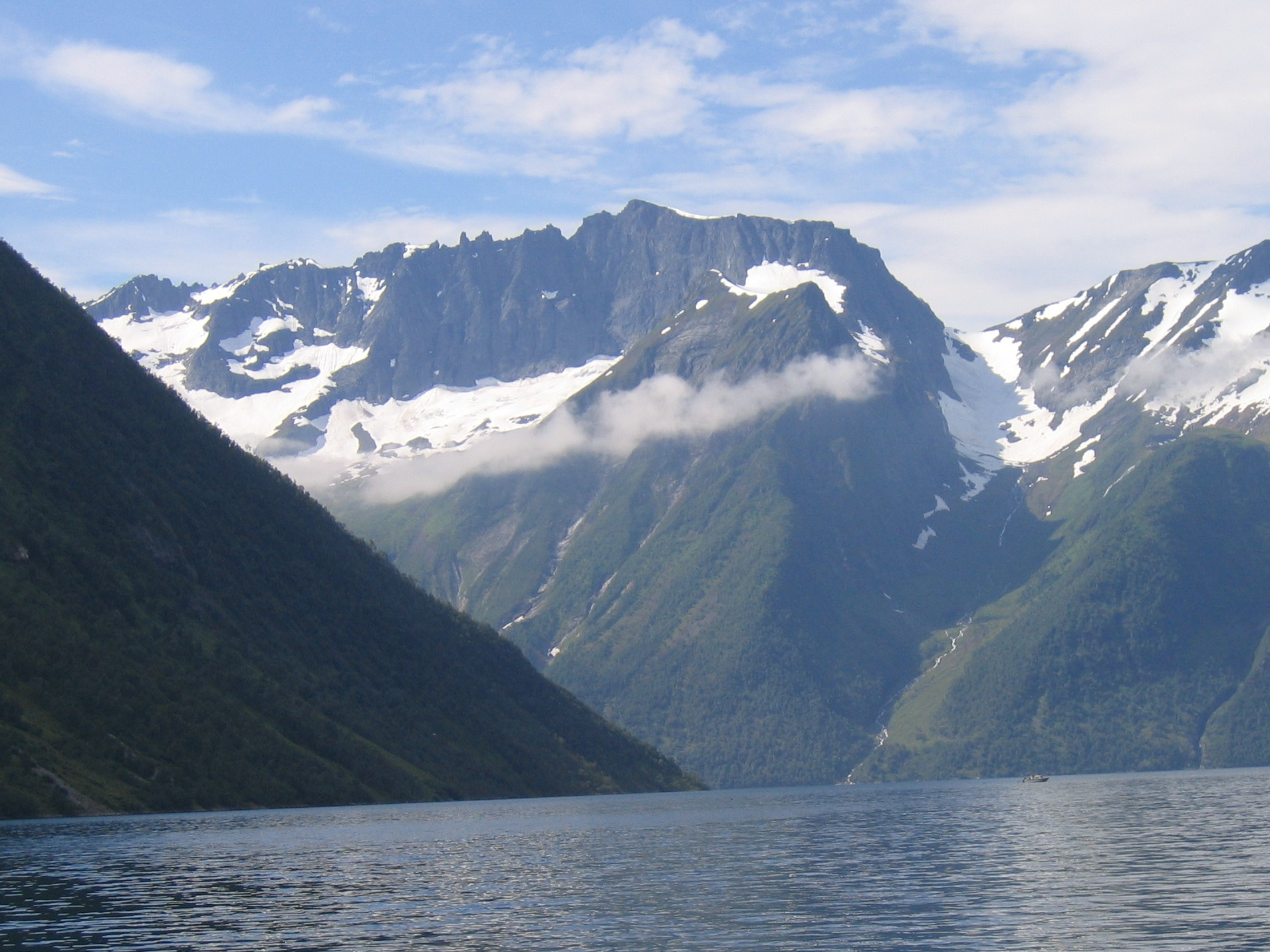 Skårasalen seen from Urke, Ørsta,Møe og Romsdal